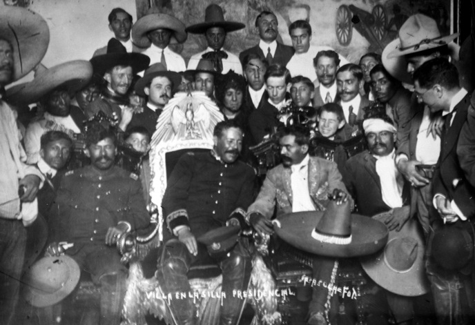 Los generales Villa y Zapata en la silla presidencial el 4 de diciembre 1914, durante la Revolución mexicana.